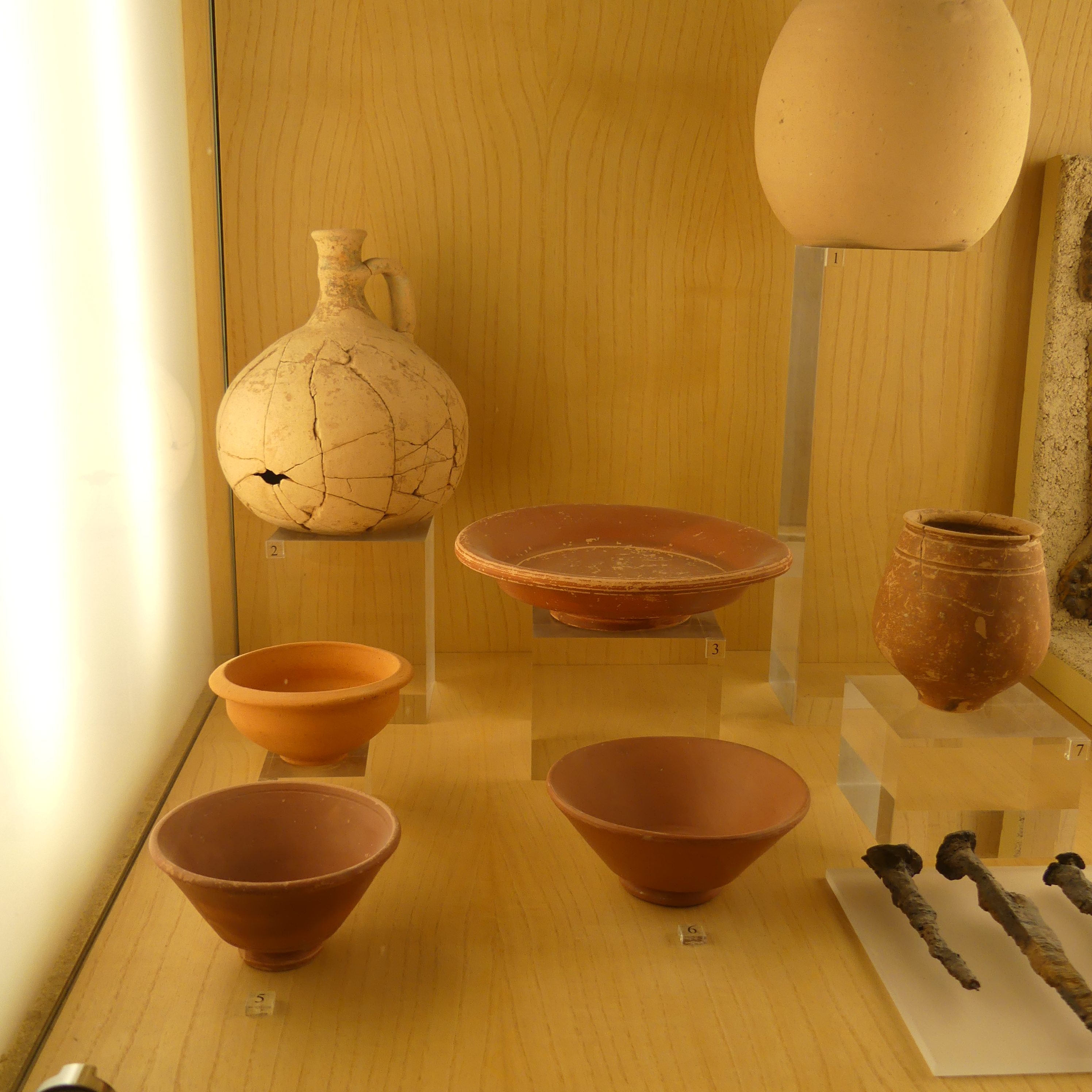 Vaisselle de céramique, cruches, gobelet, bol, assiette, clous du cercueil en fer